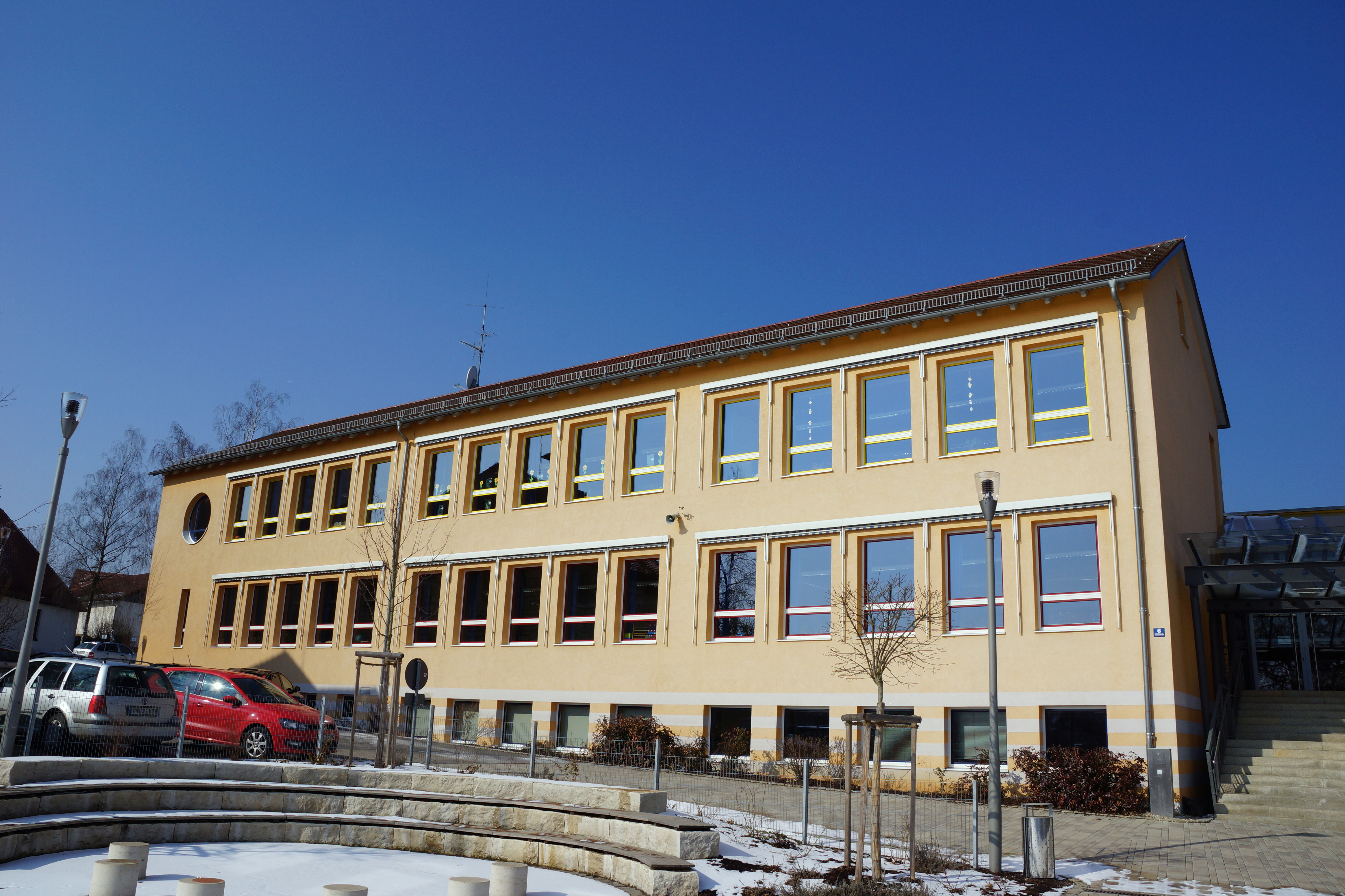 Die Schule in Seubersdorf in der Oberpfalz